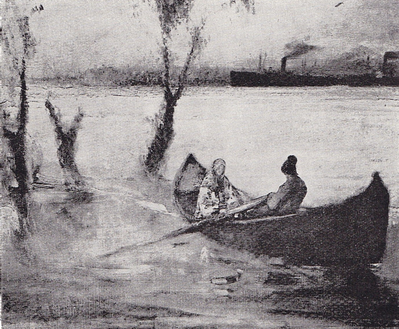 In portul Braila - La Ghecet